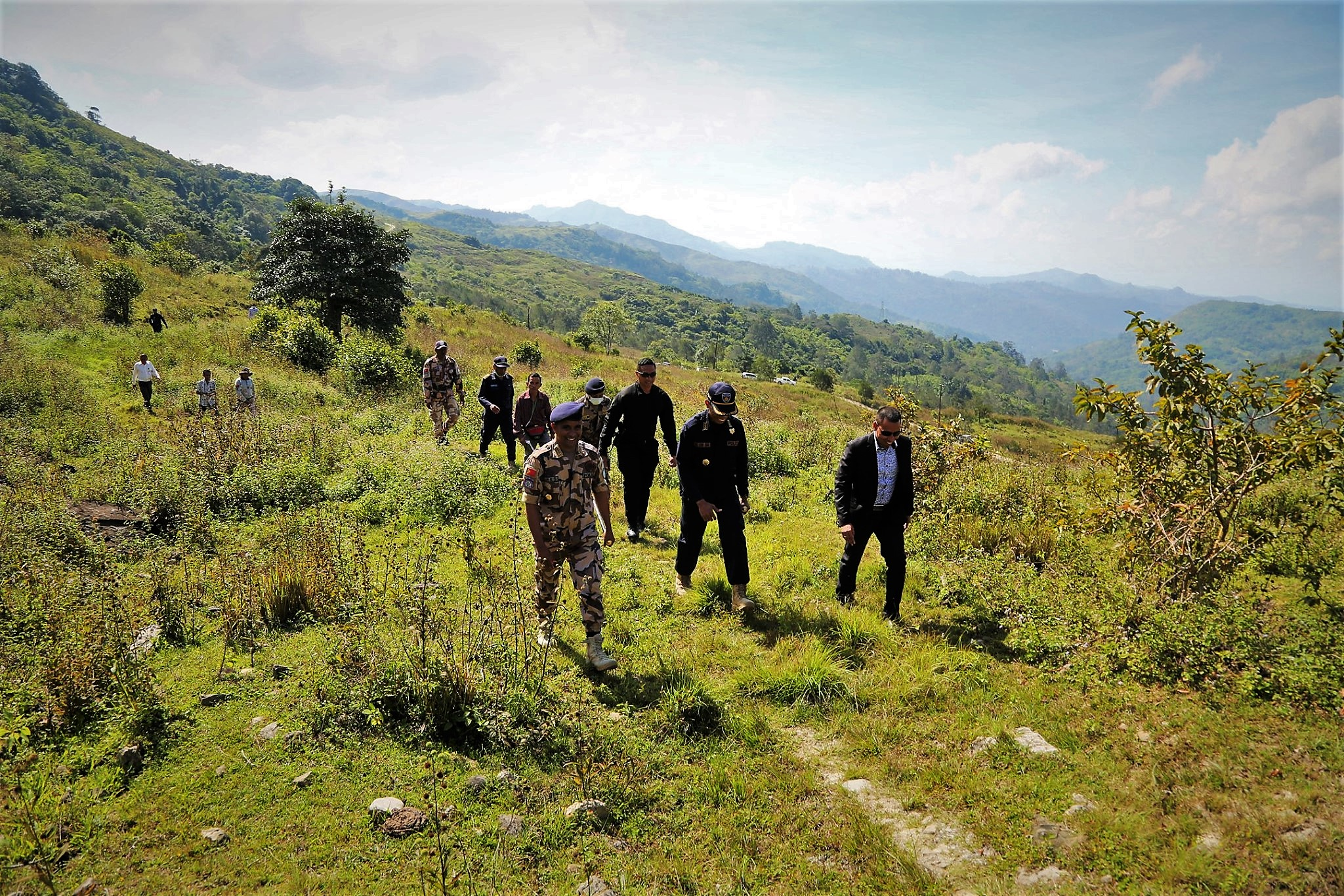 Antonino Armindo bei der UPF in Salele, Suco Maudemo, Cova Lima